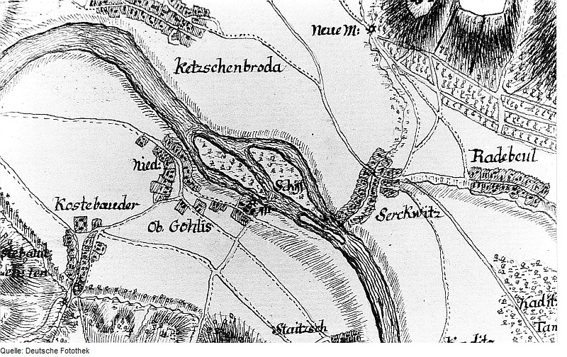 Original image description from the Deutsche Fotothek Dresden-Gohlis. Ausschnitt aus: Karte von einem Teil des Kurfürstentums Sachsen, Petri, nach 1759 (Sign.: VII 63)